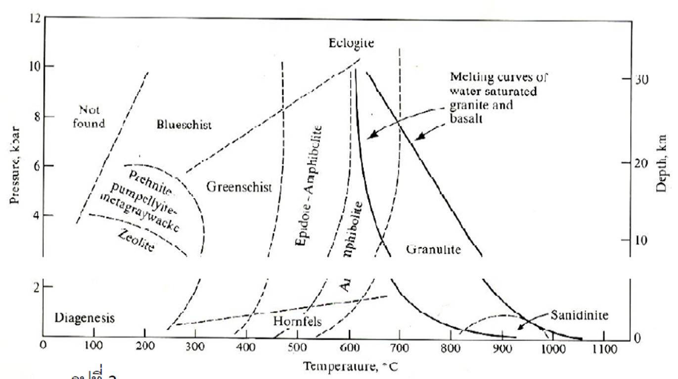 ภาพแสดงชุดลักษณ์ของการแปรสภาพ